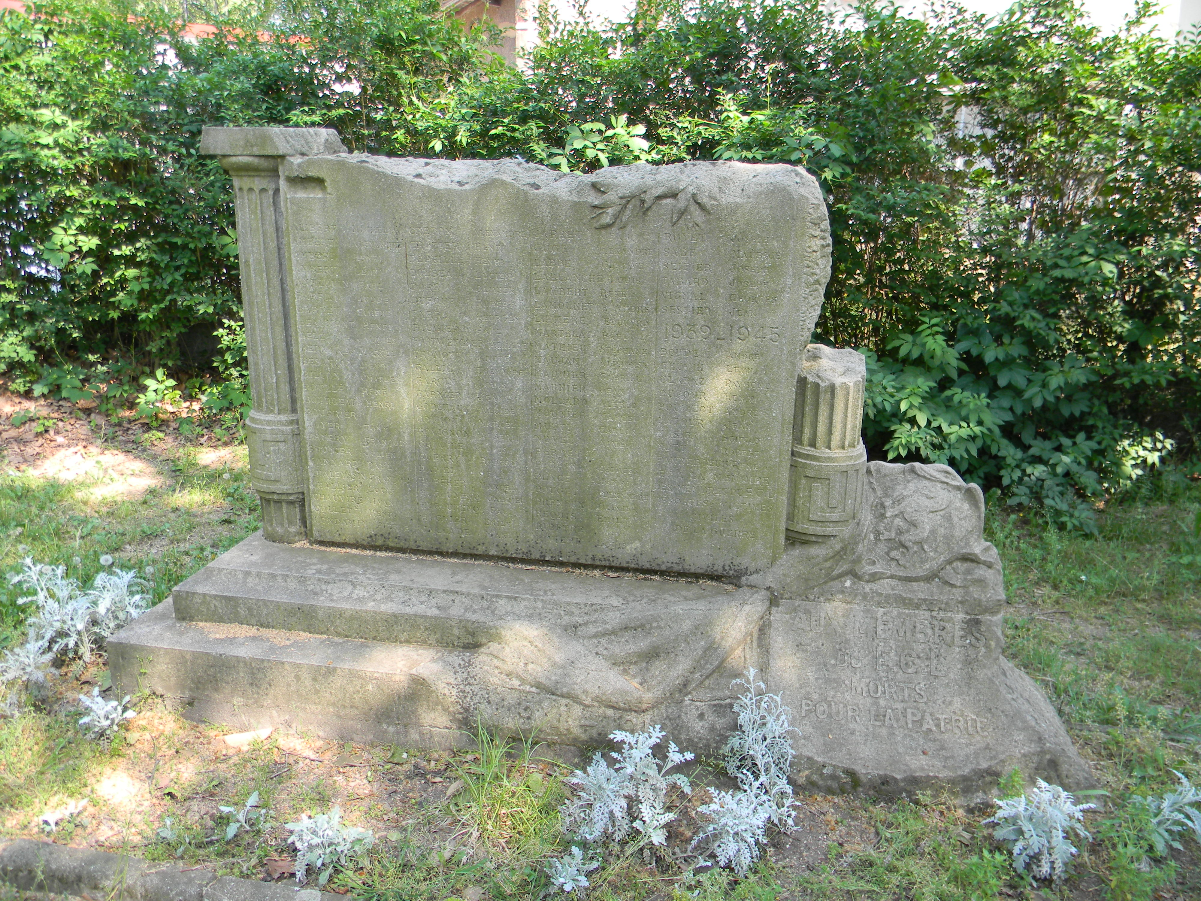 Monument aux mort: Aux membres du FCL morts pour la patrie 1914-1918 1939-1945